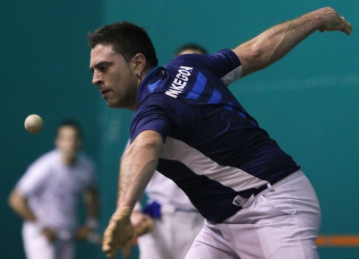 Mikel Goñi esku huskako pilotaria, 2014an